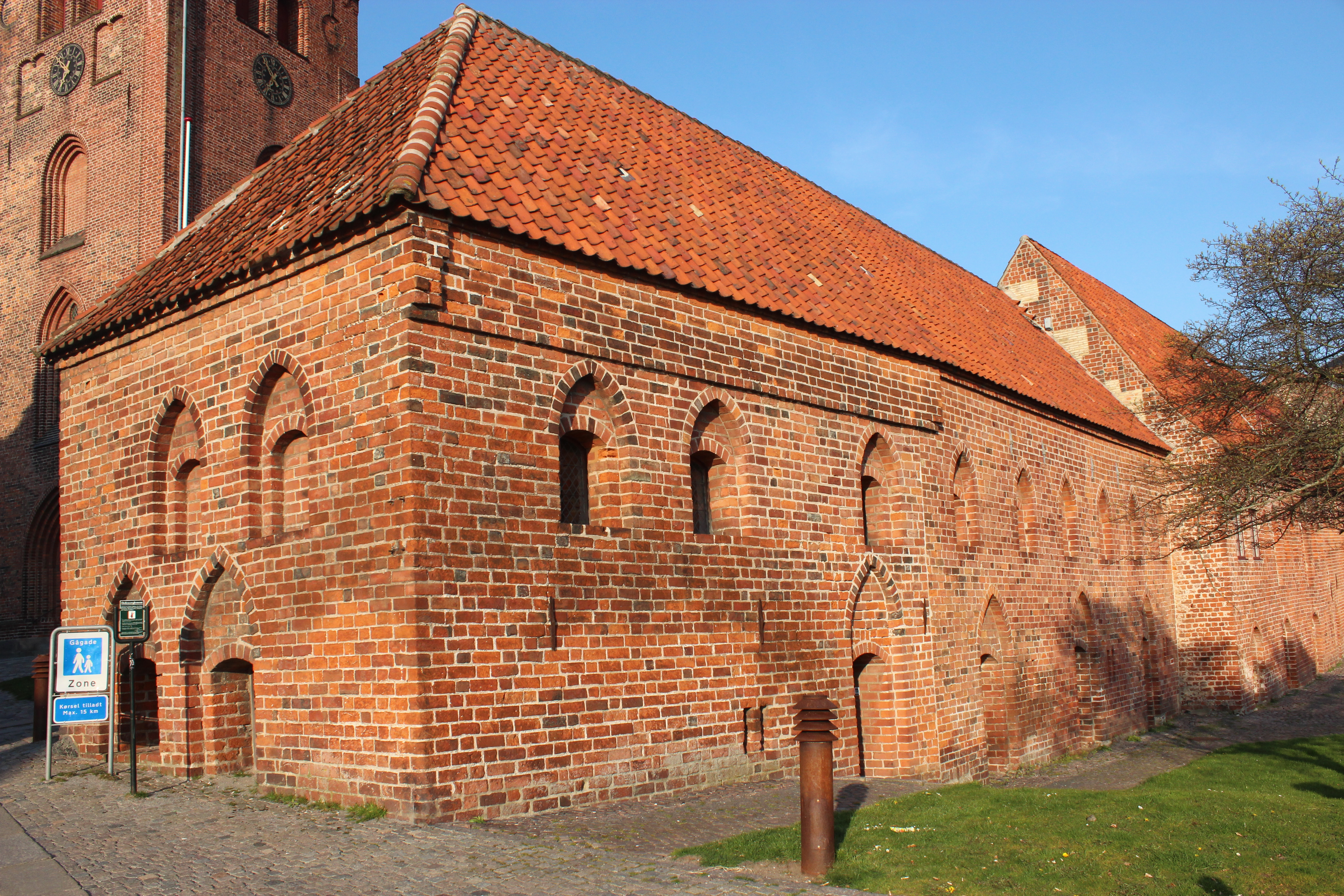 Gotschalks Boder der blev opført omkring år 1400, og er den ældste del af Boderne.